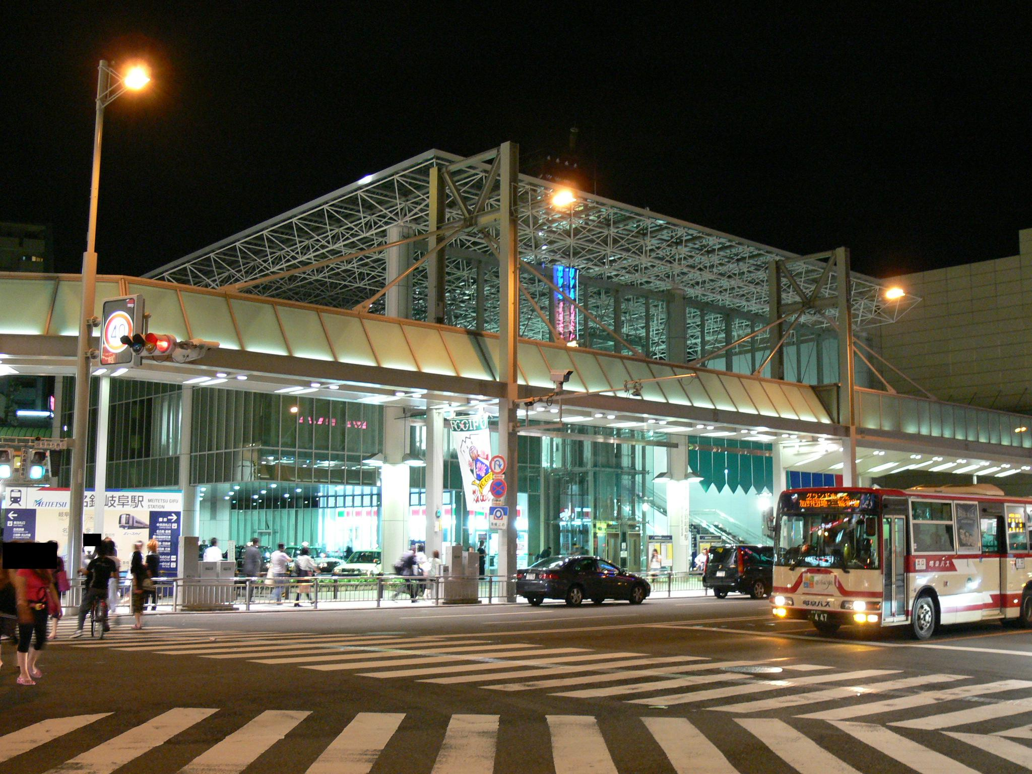 新駅舎全体写真。通行人の顔で、個人が特定されそうなものはマスキング処理した。